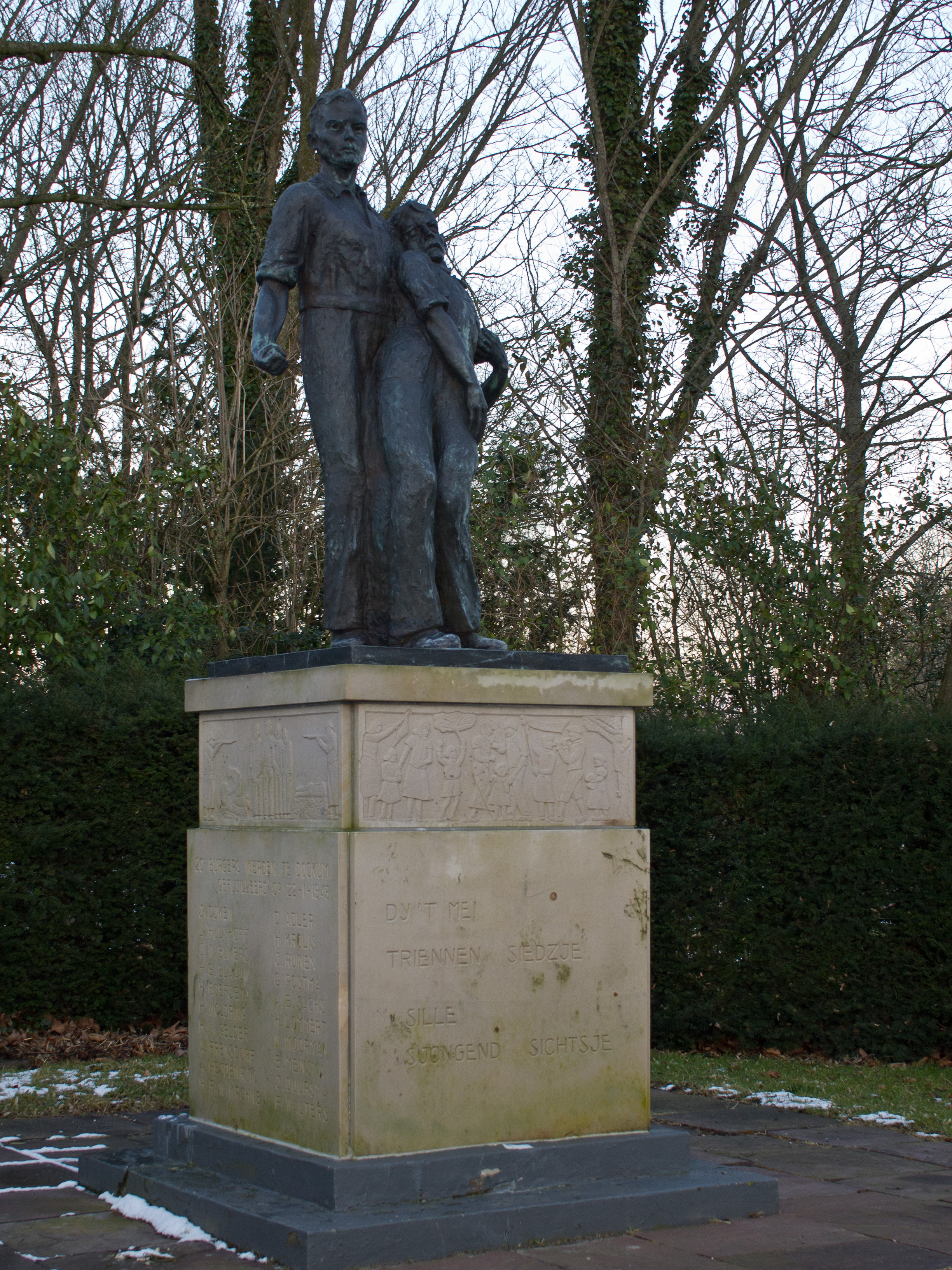 Oorlogsmonument Dokkum